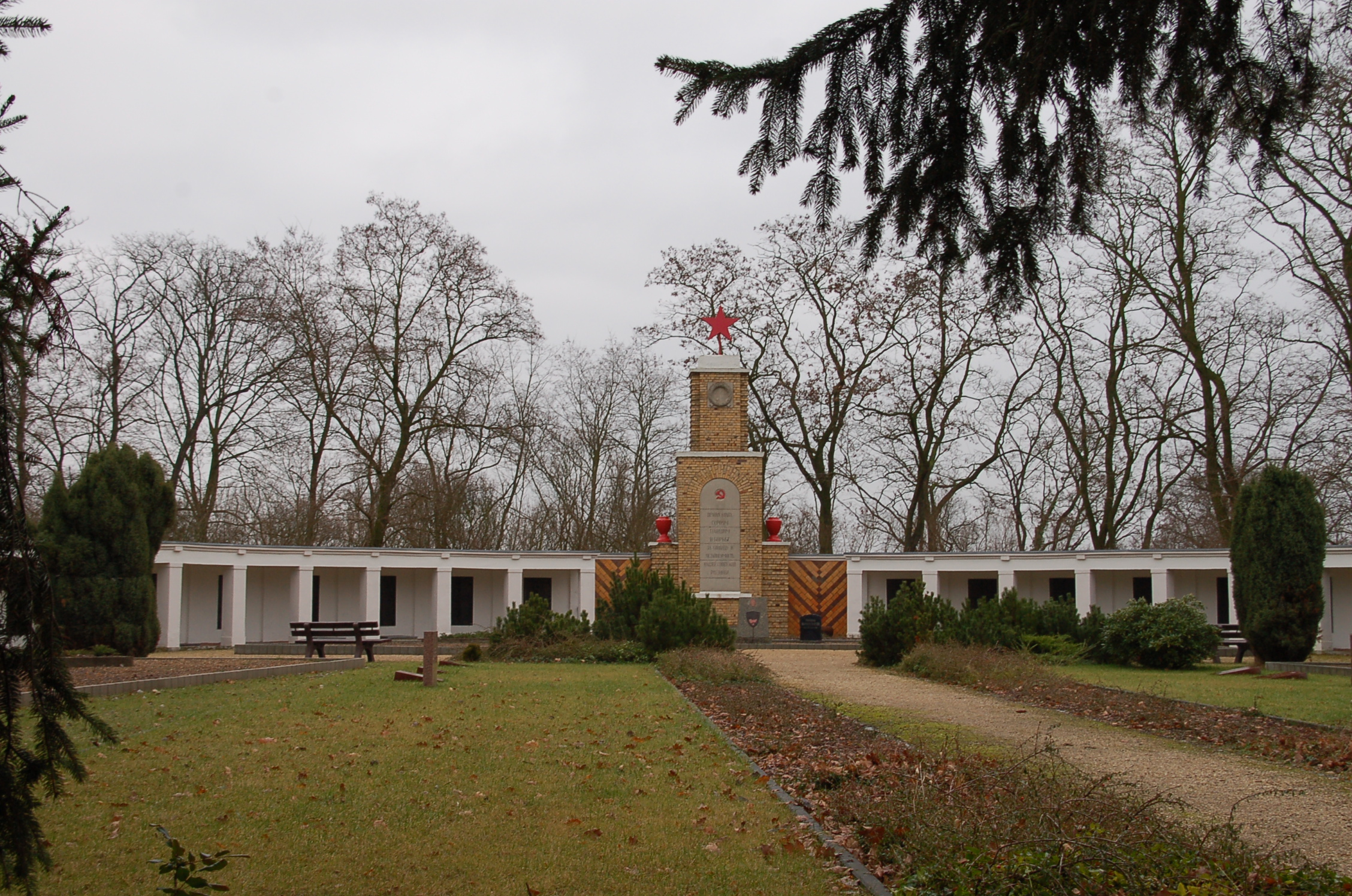 Das sowjetische Kriegerdenkmal in Lebus/Oder